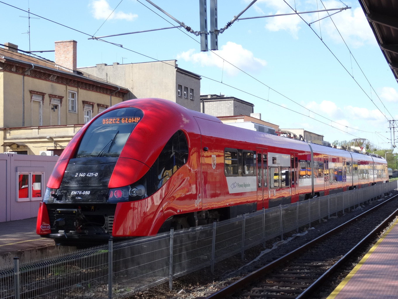 Dworzec kolejowy Bydgoszcz Główna